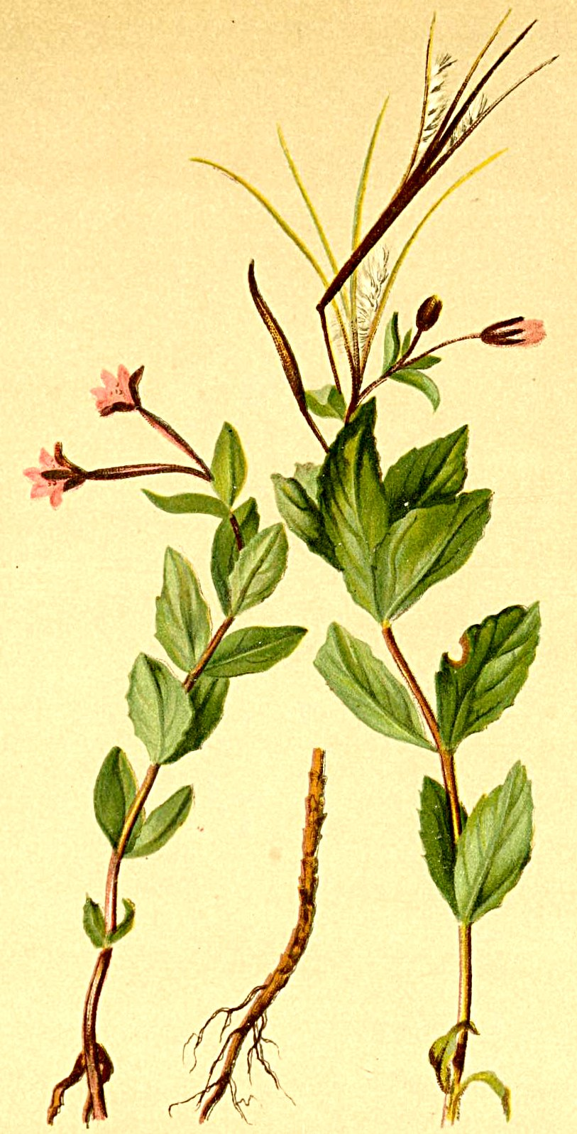 Epilobium alsinefolium